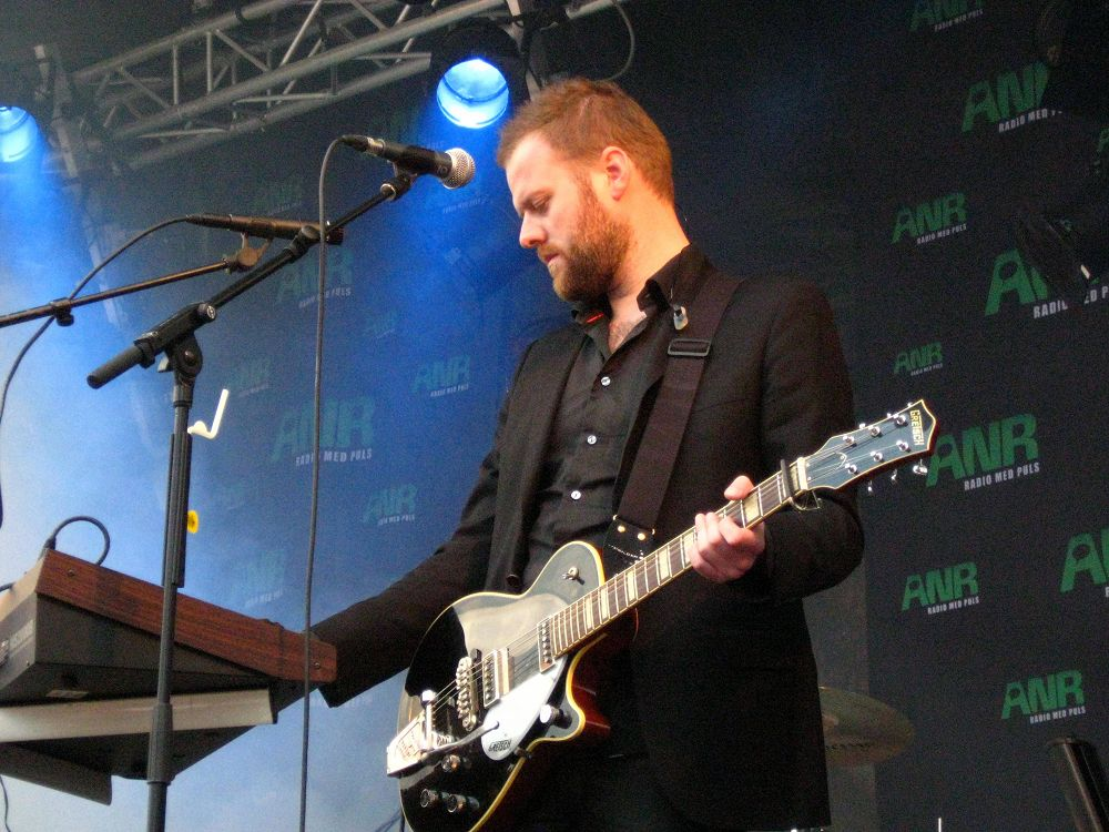 Troels Holdt (Nordstrøm)